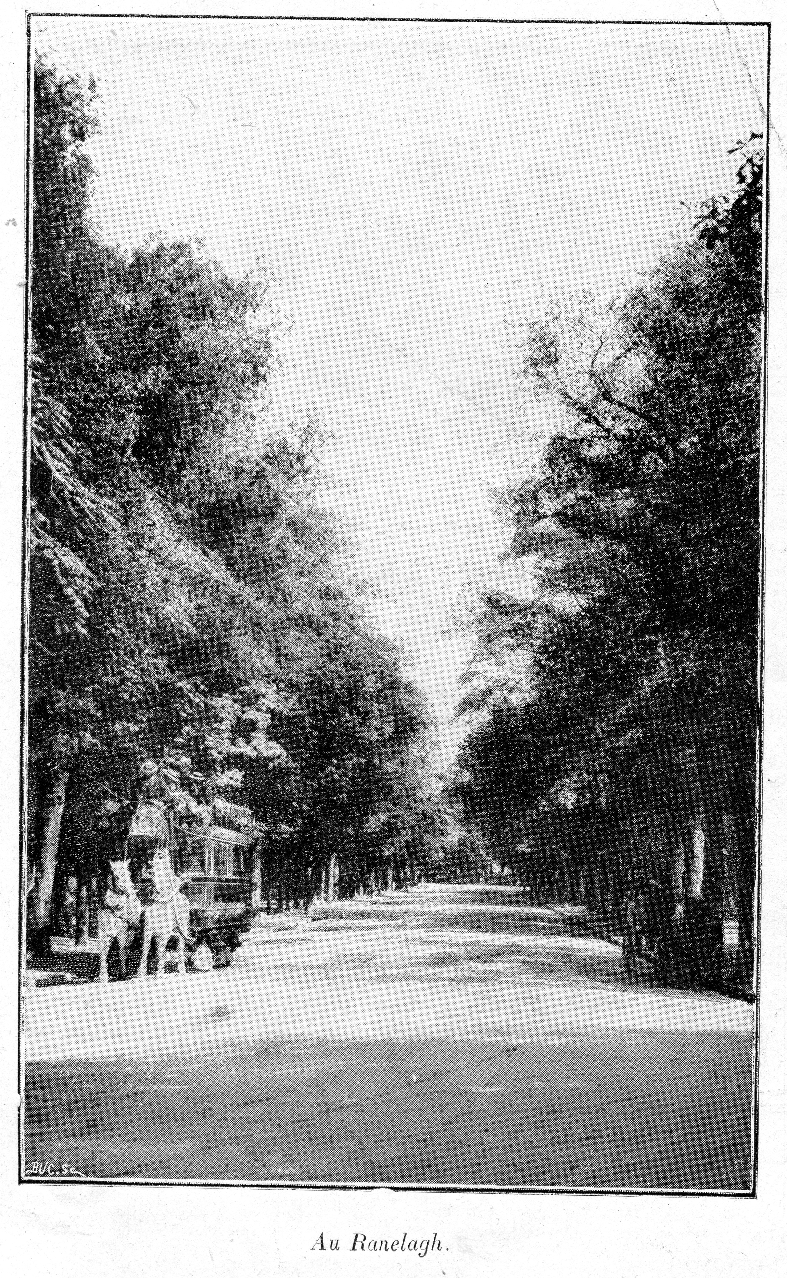 Clément Maurice: Paris en plein air, BUC, 1897. Au Ranelagh